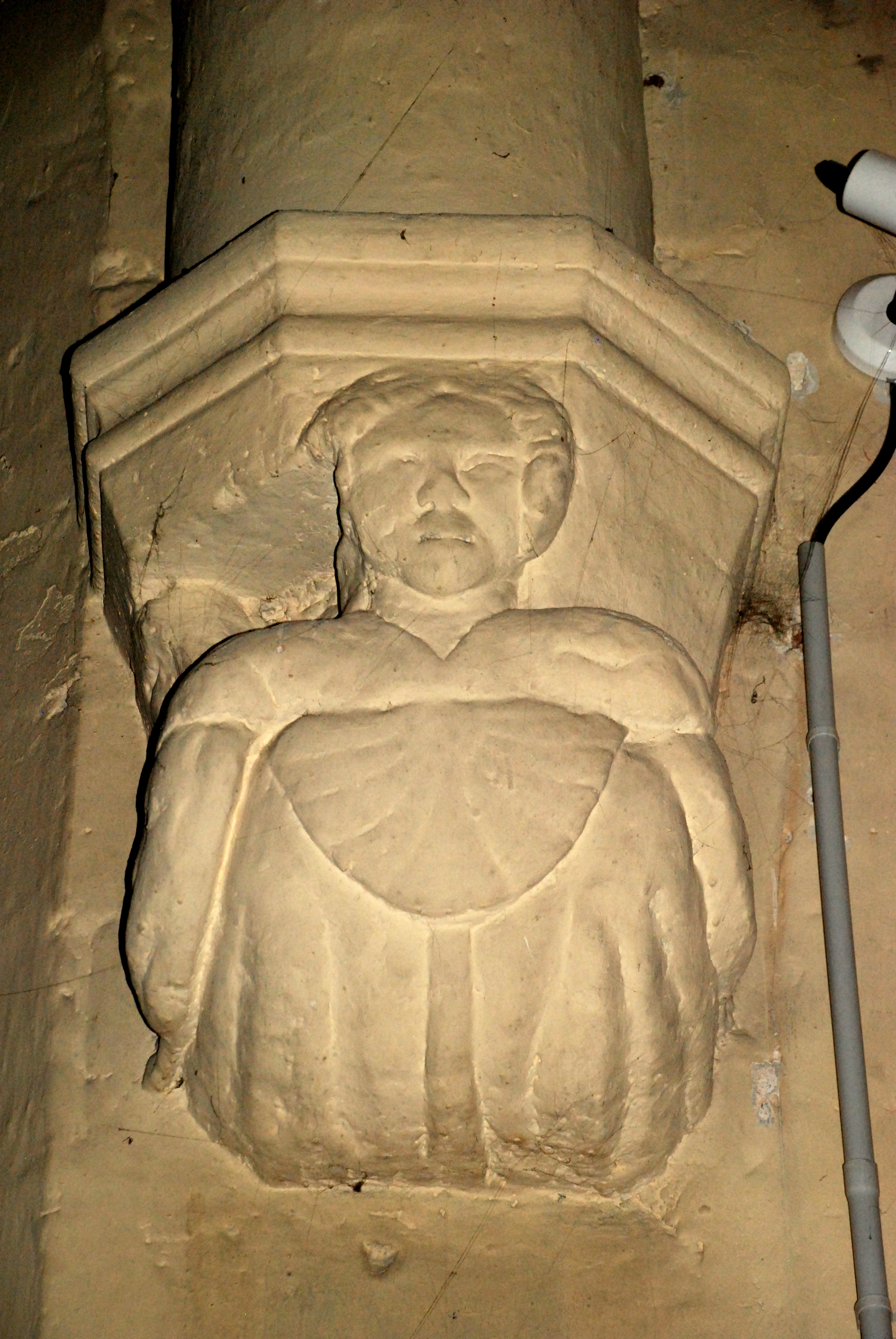 France - Gard - Église Saint-Saturnin de Calvisson